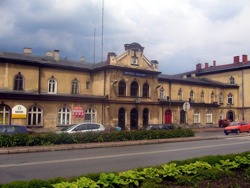 Centralna część dworca kolejowego w maju 2010.